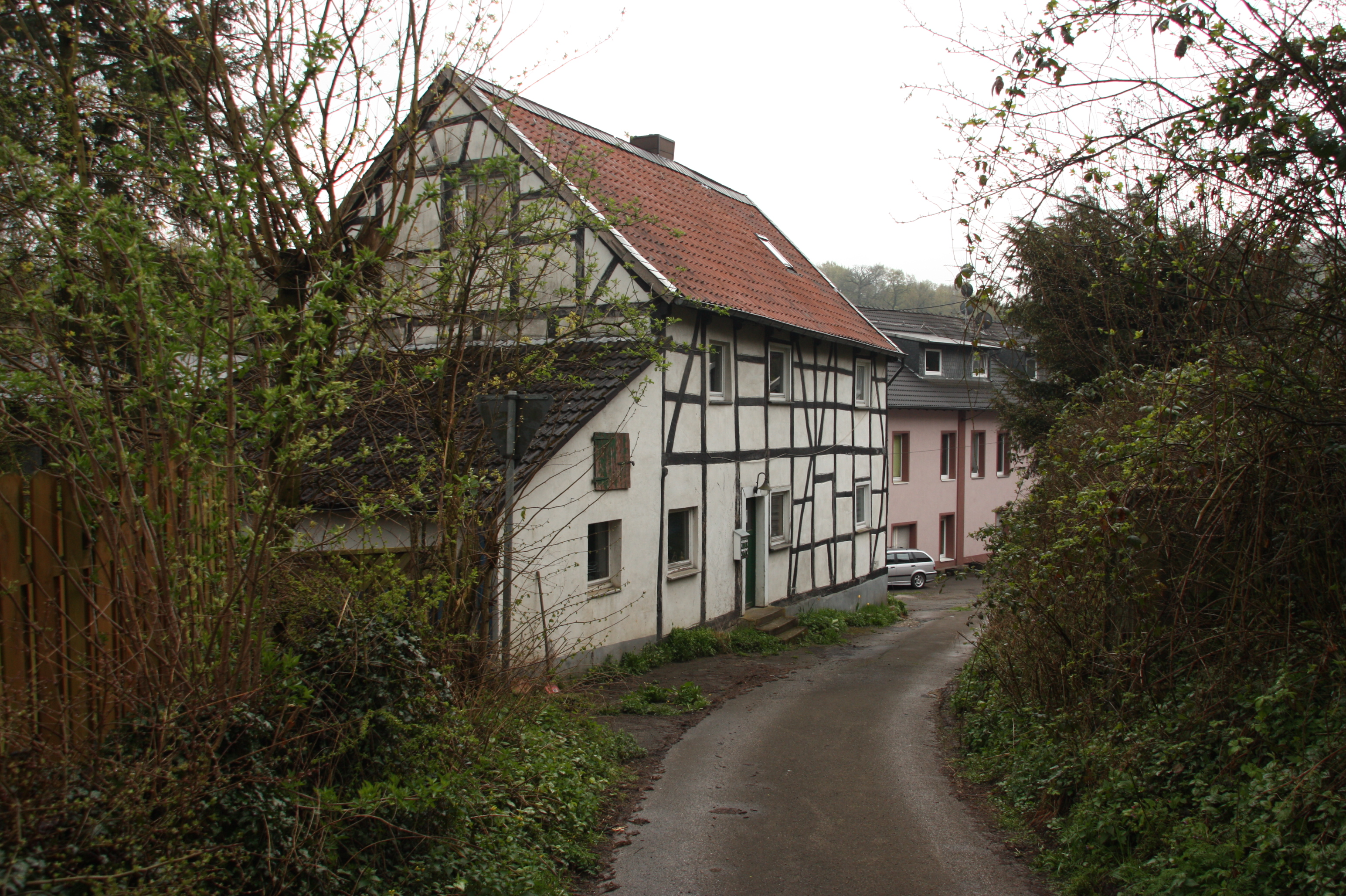 Velbert, Hefel, Reckhammer, Fachwerkhaus